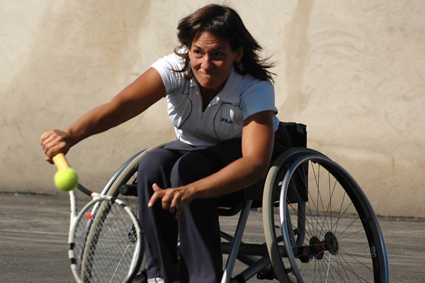 club esportiu guttmann